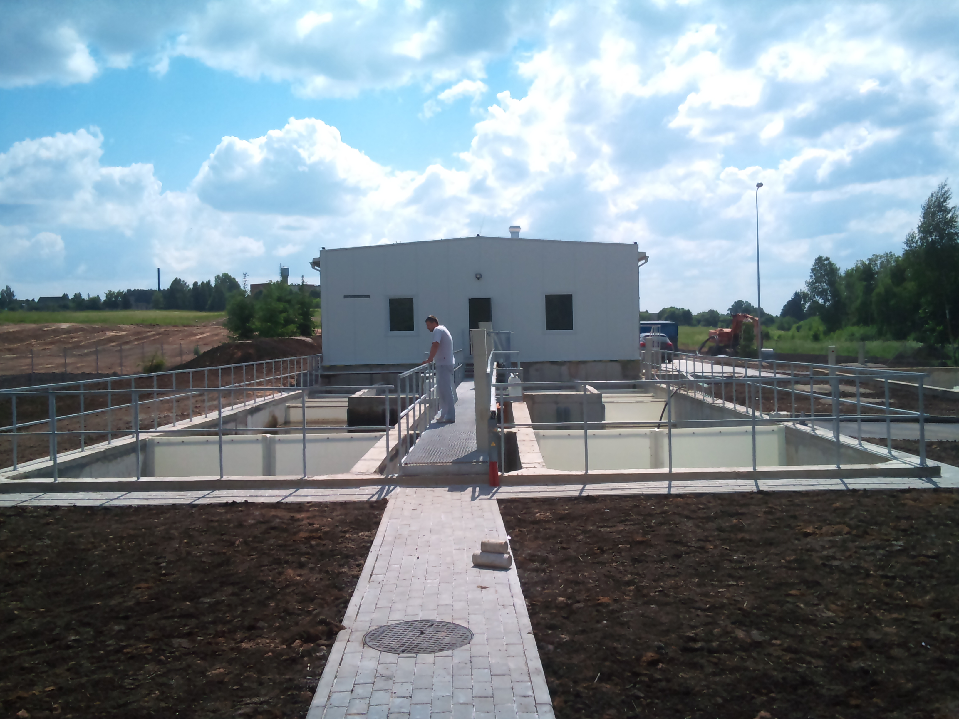 čistiareň odpadových vôd pre približne 3000 EO